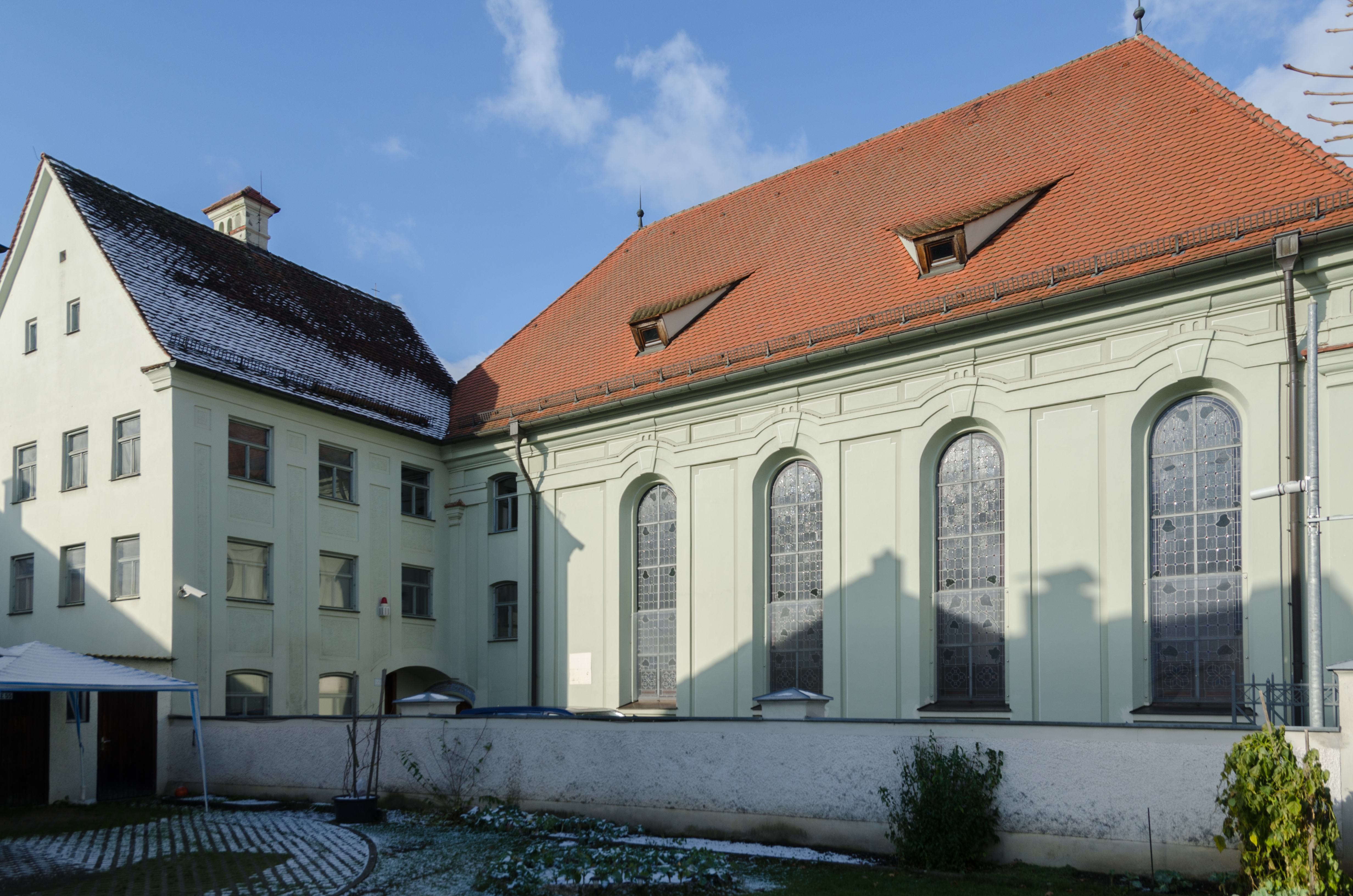 Ichenhausen, Vordere Ostergasse 22